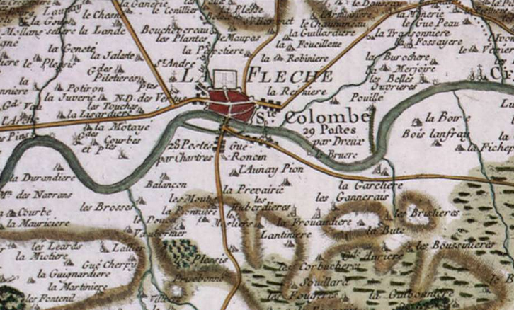 Carte Cassini de la région de La Flèche